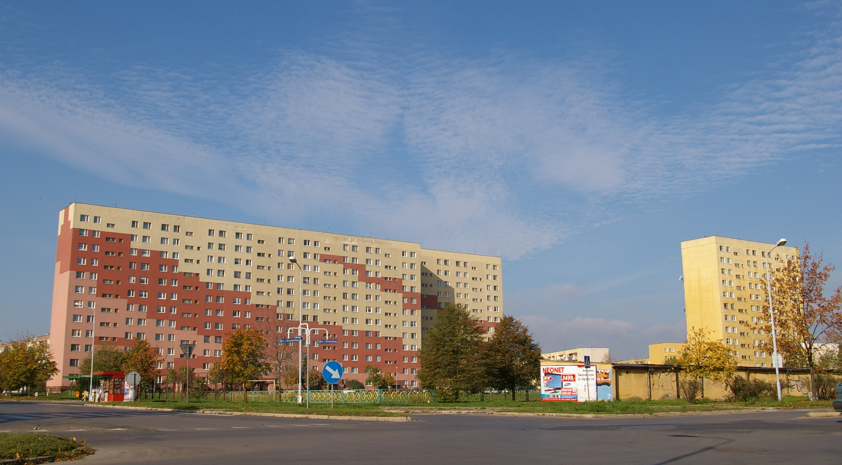 Bloki na osiedlu Ogrody w Ostrowcu Świętokrzyskim